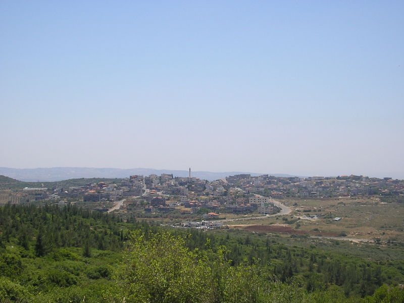 כאוכב אבו אל היג'א. מבט משכניה. צולם על ידי